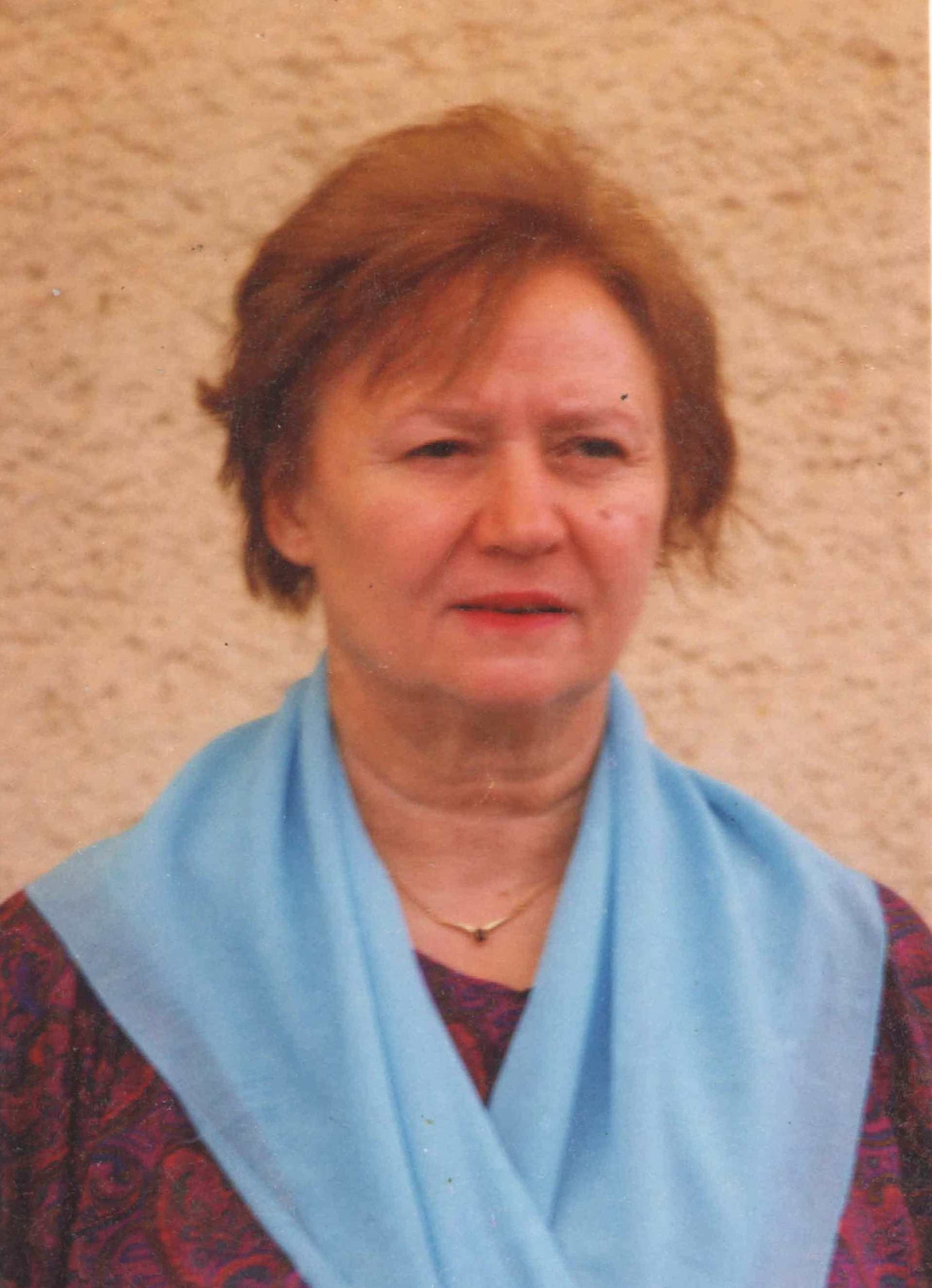 Dr Szilasi Anna